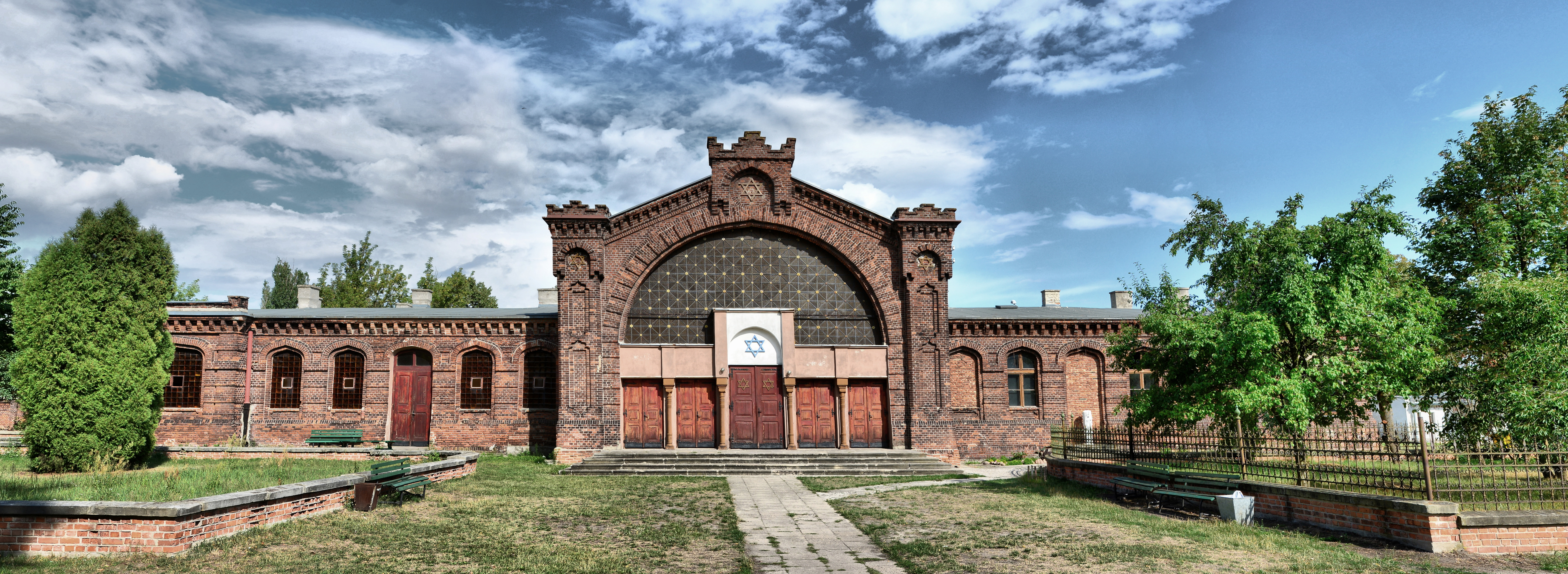 Bałuty-Doły, Nowy cmentarz żydowski w Łodzi